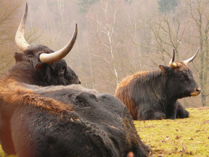 Heckrinder im Eiszeitlichen Wildgehege Neandertal